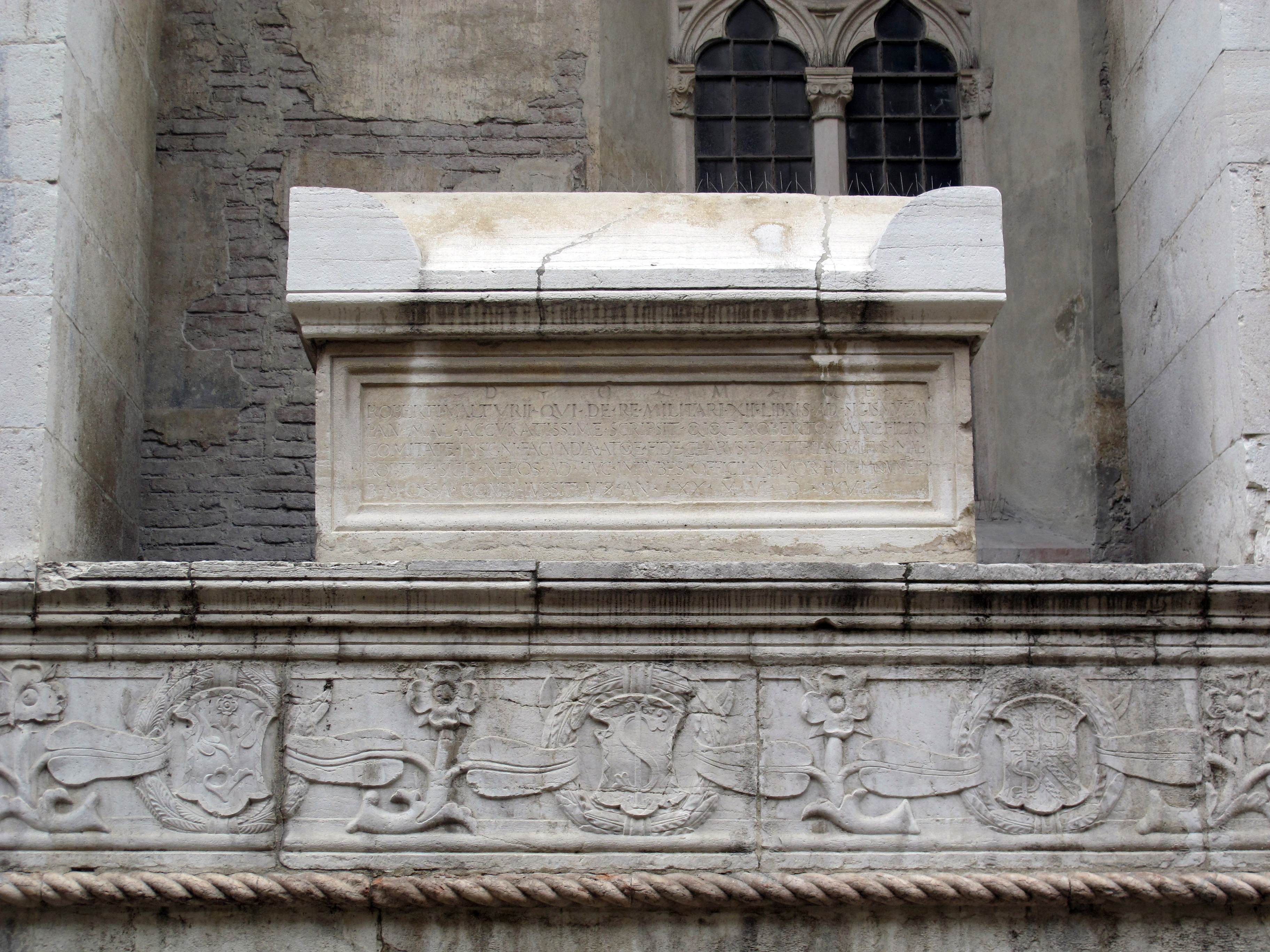 Tempio Malatestiano - MIBAC This is a photo of a monument which is part of cultural heritage of Italy.